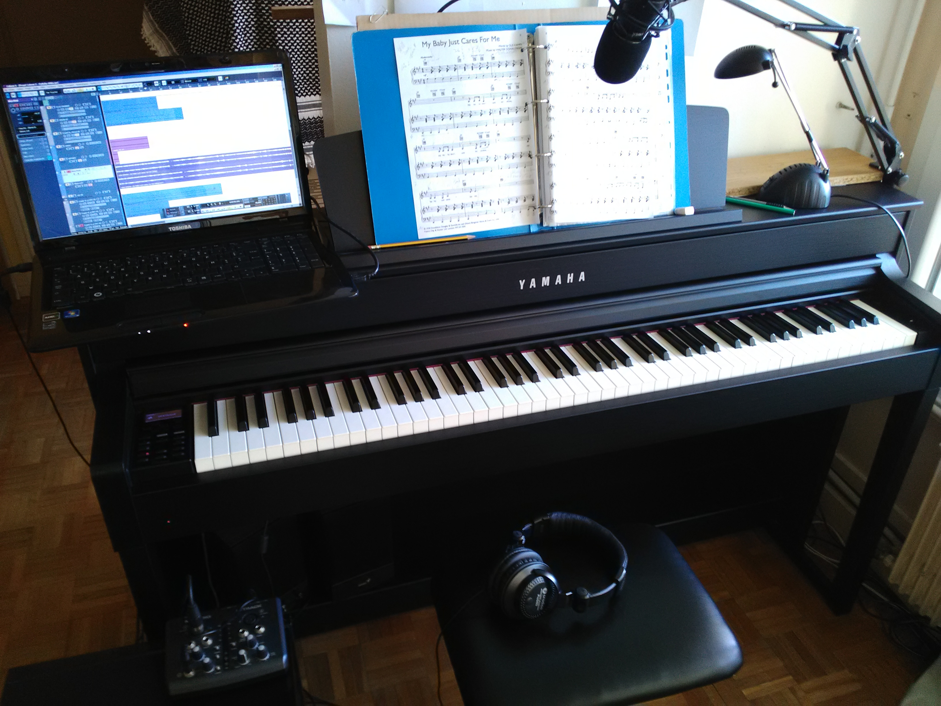 Enregistrement multipiste à la maison avec séquenceur logiciel sur PC (ici Cubase de Steinberg) et carte son externe avec micro cardioide pour le chant.